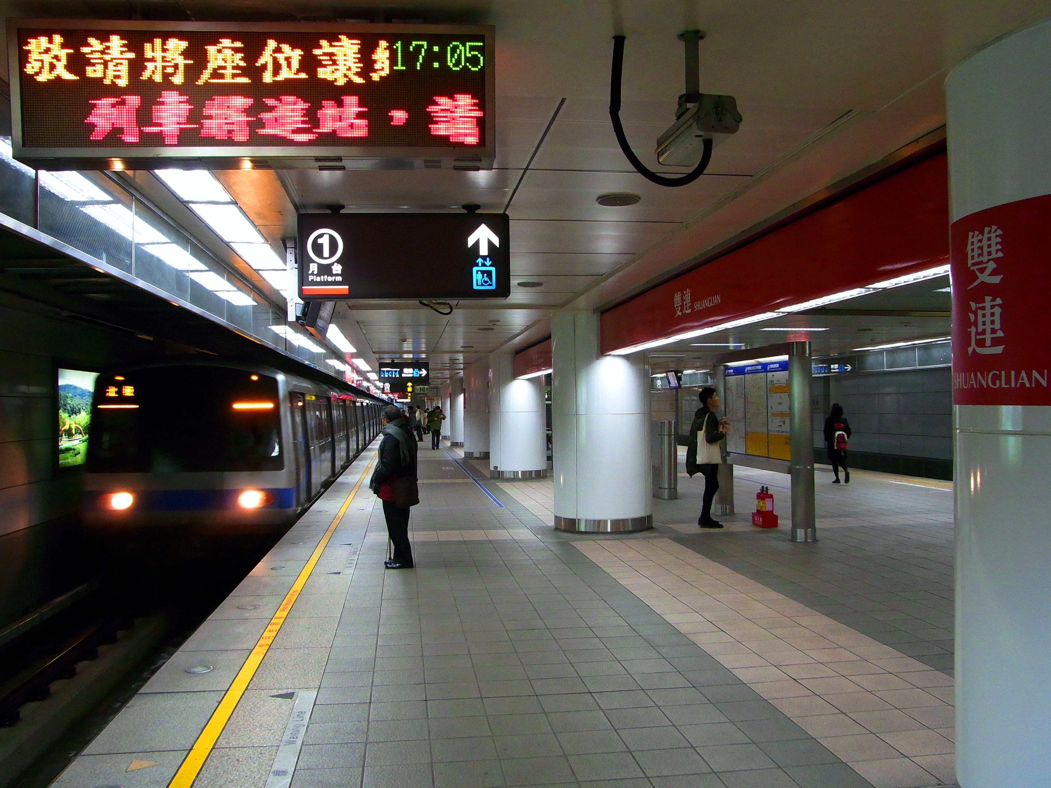 台北捷運雙連站第1月台。